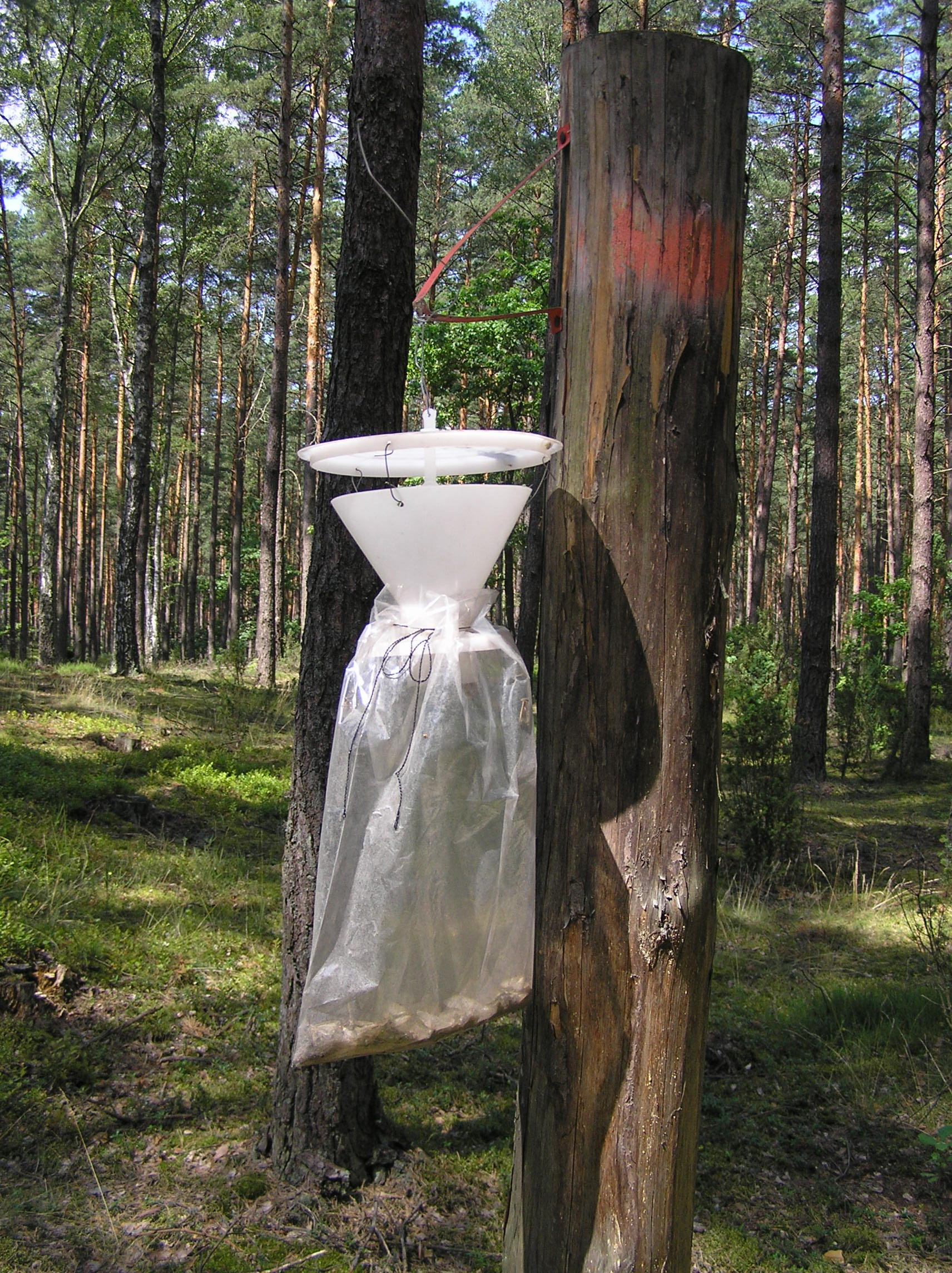 Feromon trap for Lymantria monacha, Brok, Polska